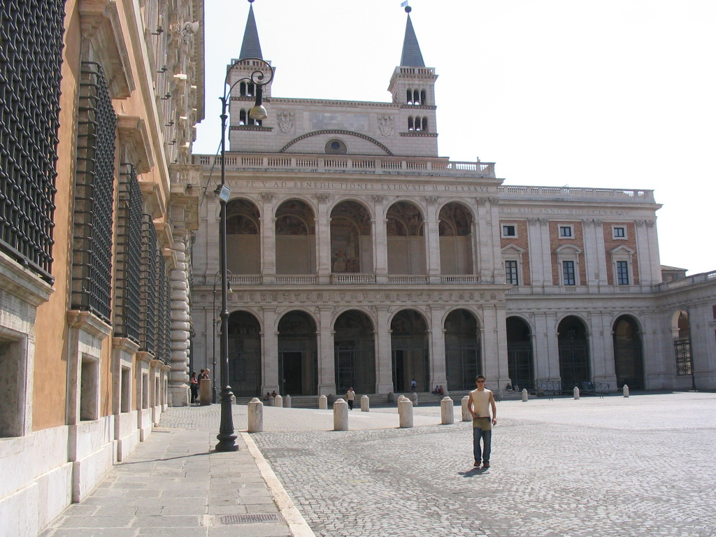 Das Bild zeigt den Lateranspalast und das Seitenportal der Lateransbasilika von der Piazza S. Giovanni in Laterano aus.